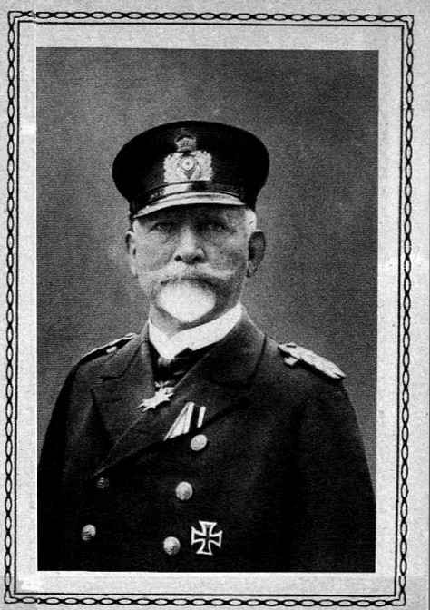 Ludwig von Scröder amiral en 1916.